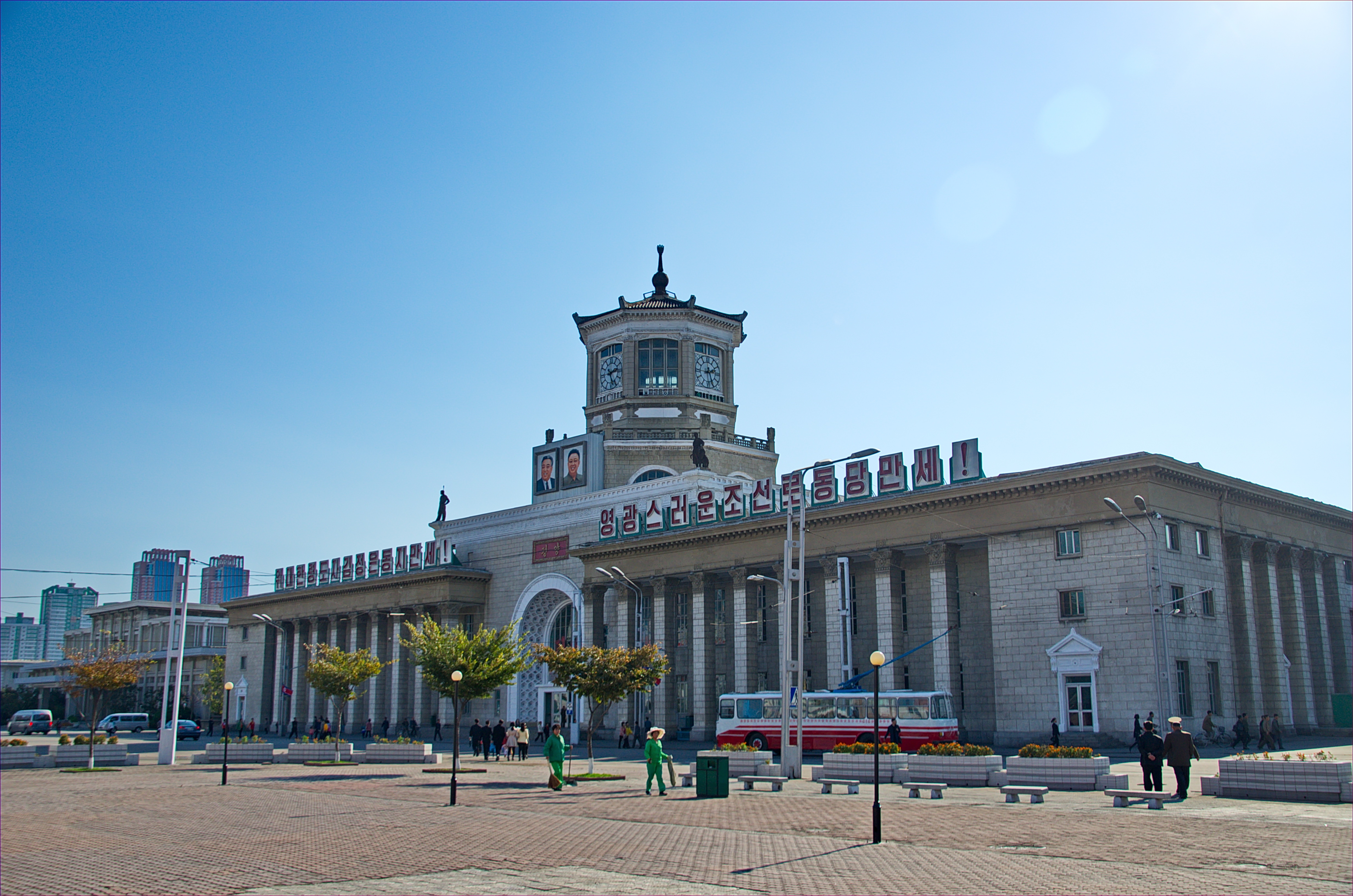 Nordkorea 2015 - Pjöngjang - Bahnhof